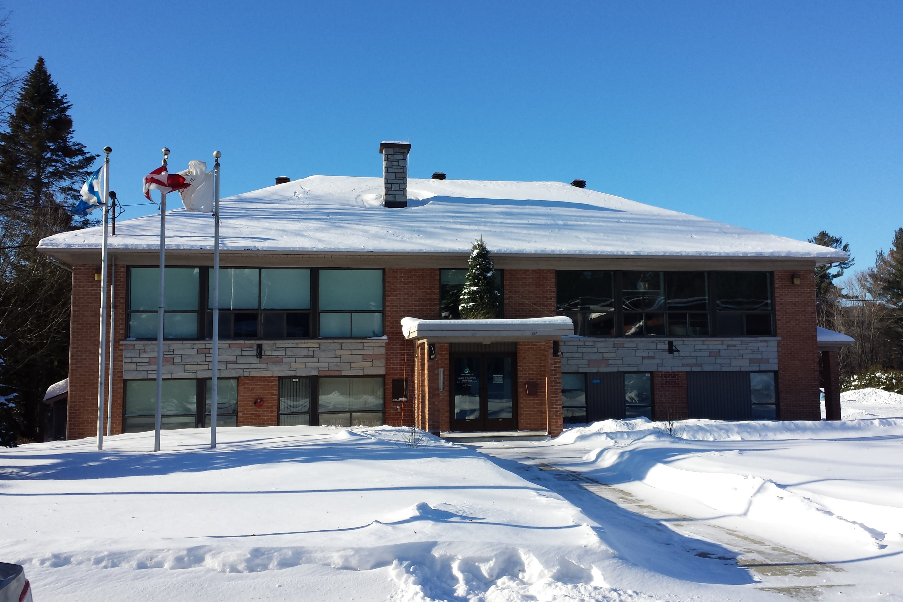 Saint-Hippolyte, Quebec, Canada